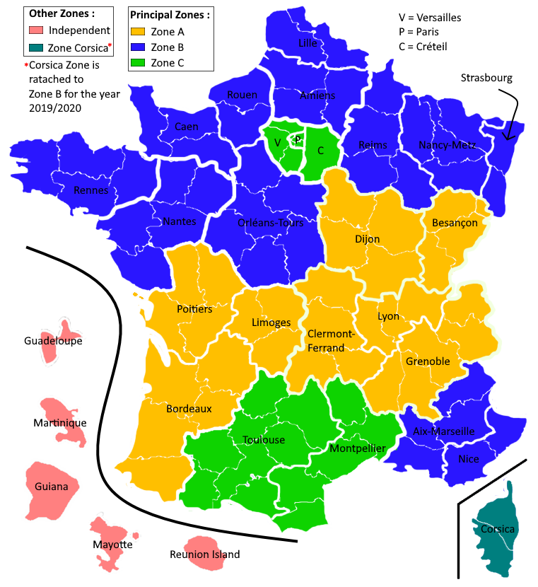 Carte des zones des académies françaises pour l'année scolaire 2019/2020.